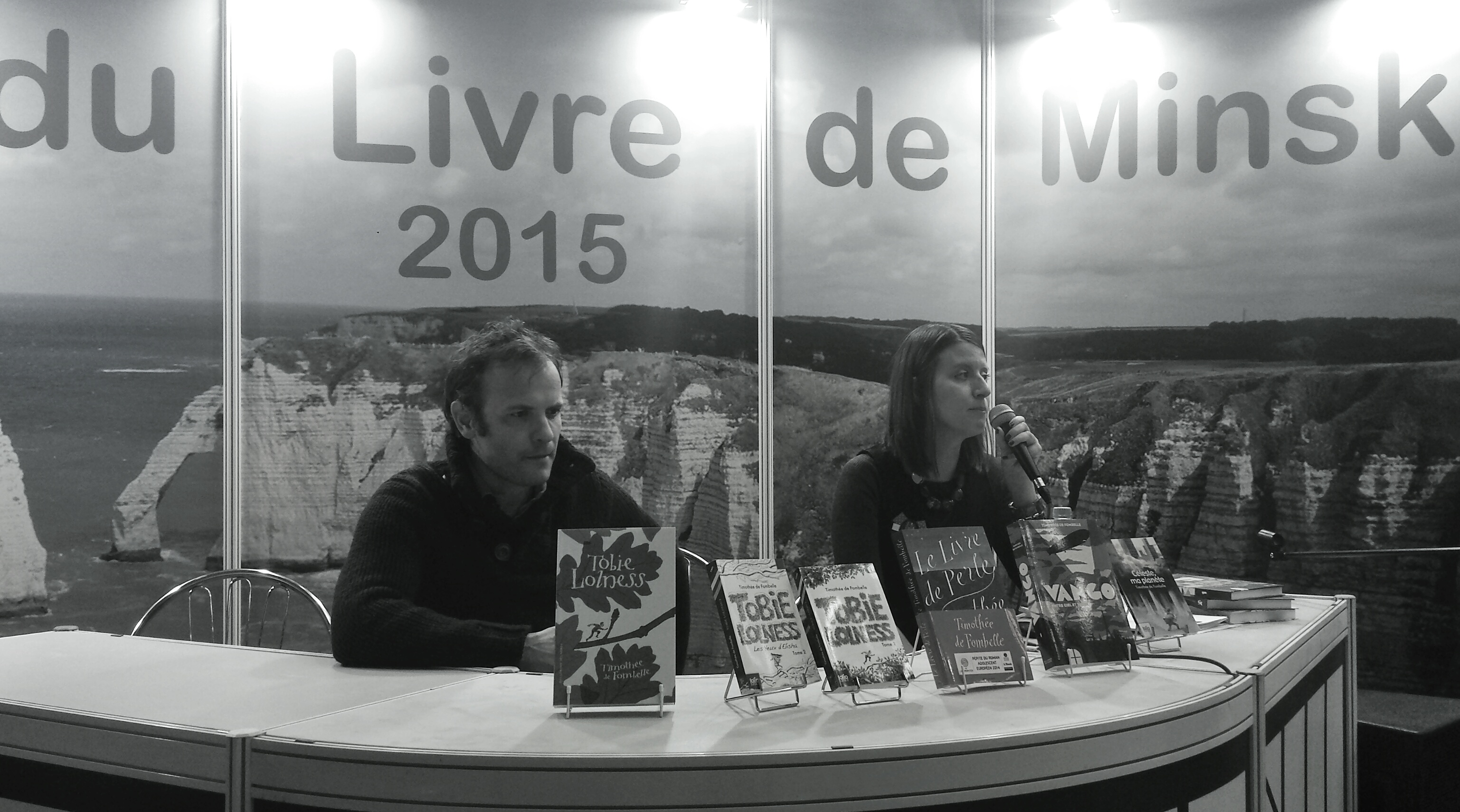 Timothée de Fombelle Minsk salon livre